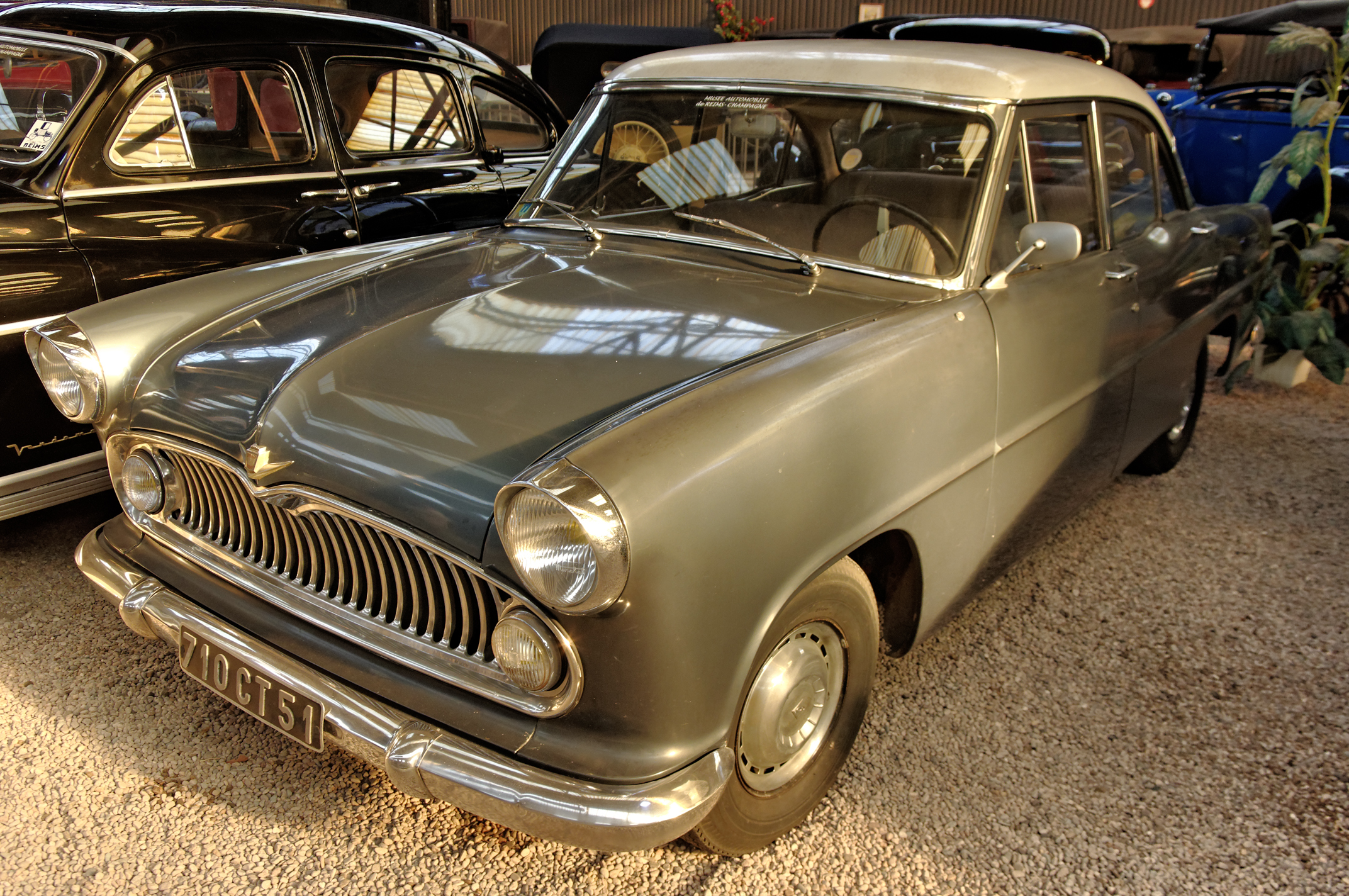 Simca Versailles (1955), Berline, 8 cyl. en V à soupapes latérales, 2351 cm3, 80 ch. S.A.E., vitesse max. 140 km/h(Musée Automobile Reims Champagne, Reims, Marne, France)